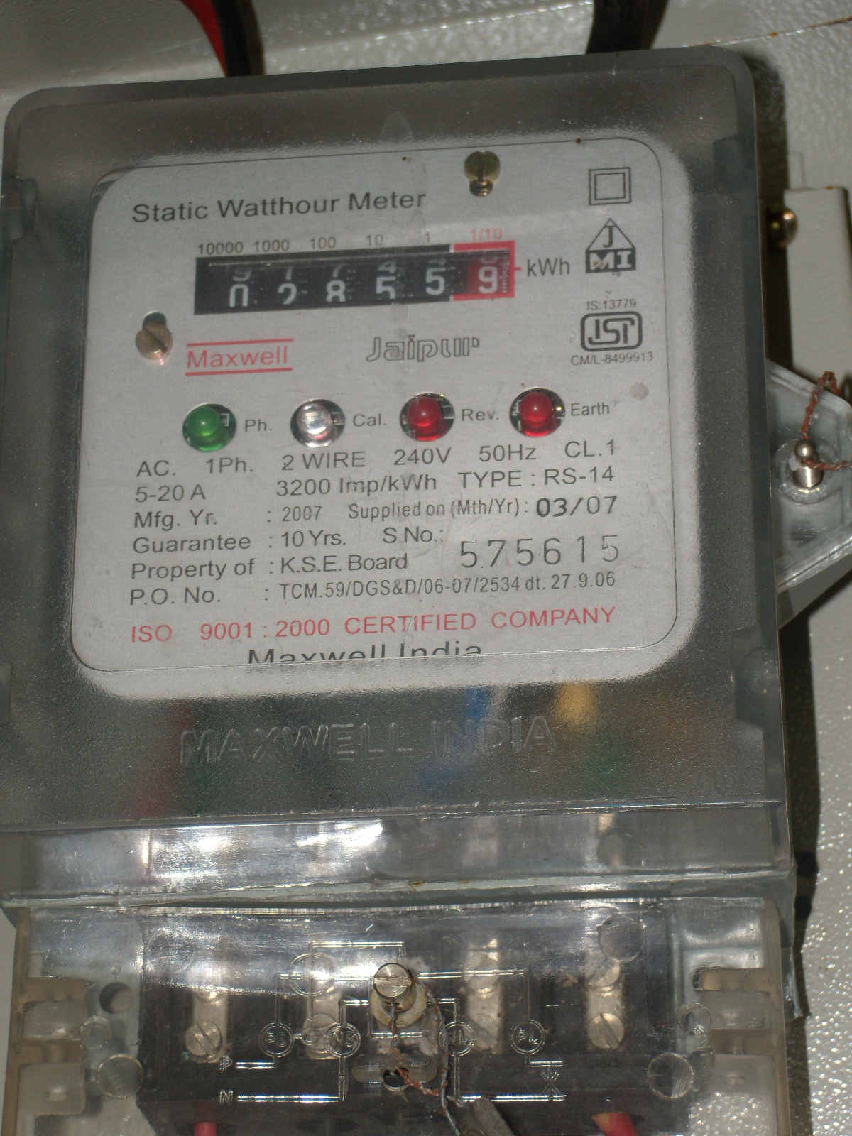 വെദ്യുതോർജ്ജമാപിനി. വൈദ്യുതിയുടെ അളവ് രേഖപ്പെടുത്താനുപയോഗിക്കുന്നു.